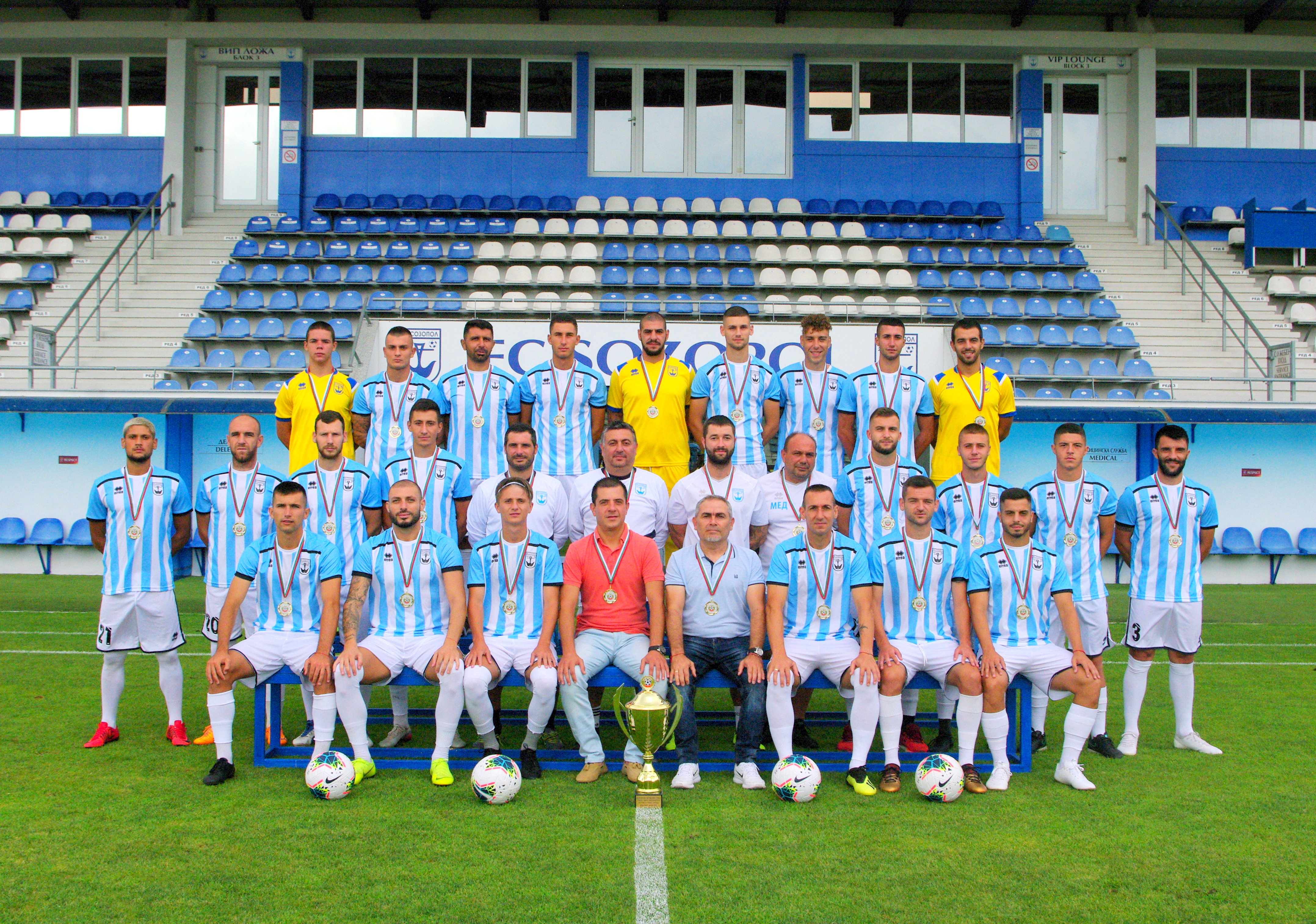 Созопол - Шампион на Трета лига - Югоизток - сезон 2019-2020